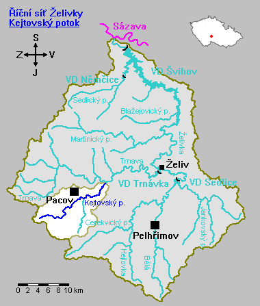 Říční síť Želivky - Kejtovský potok